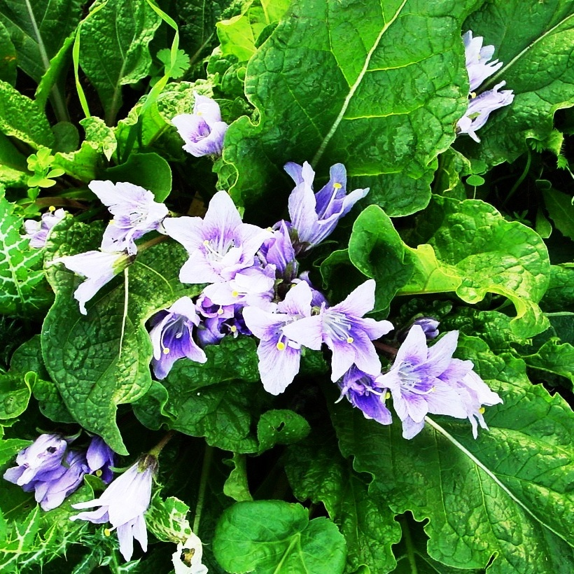 Riserva dello Zingaro, Sicily Mandragora autumnalis Bertol.